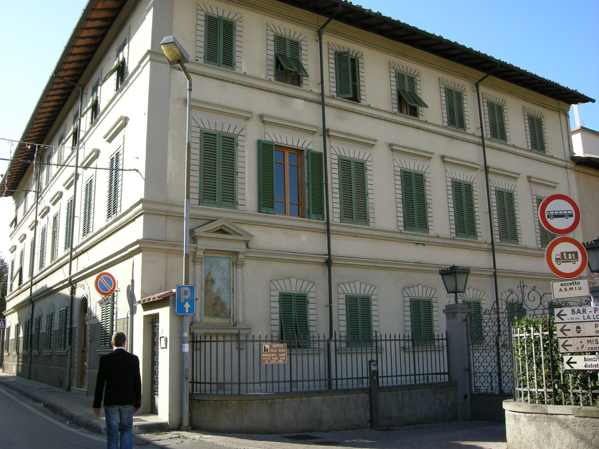 Poggio a caiano, istituto suore minime